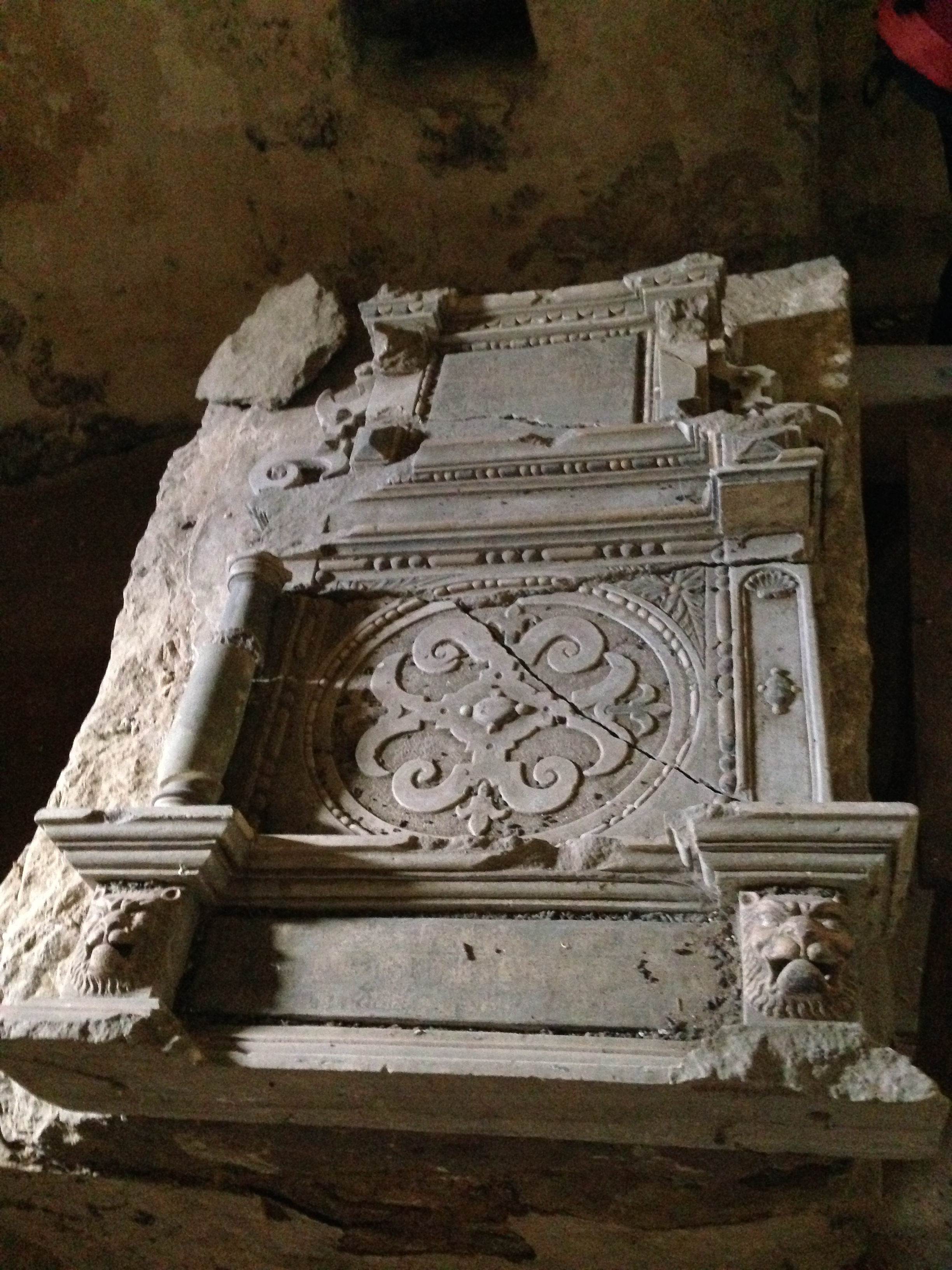 zerstörter Altaraufsatz in der St.-Anna-Kapelle in Krobitz